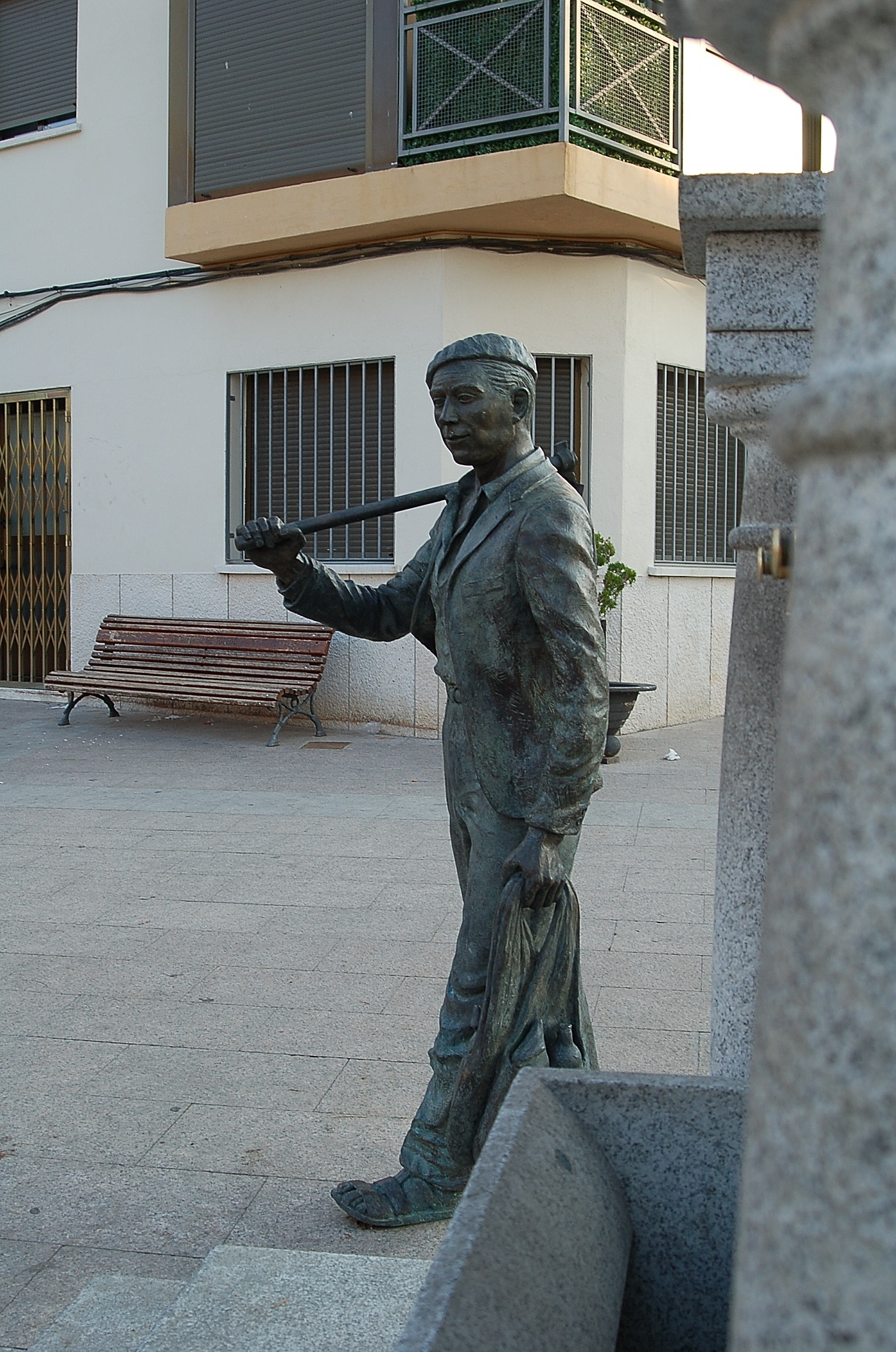 Grupo escultórico, figura en bronce, homenaje al labrador, Plaza de España.